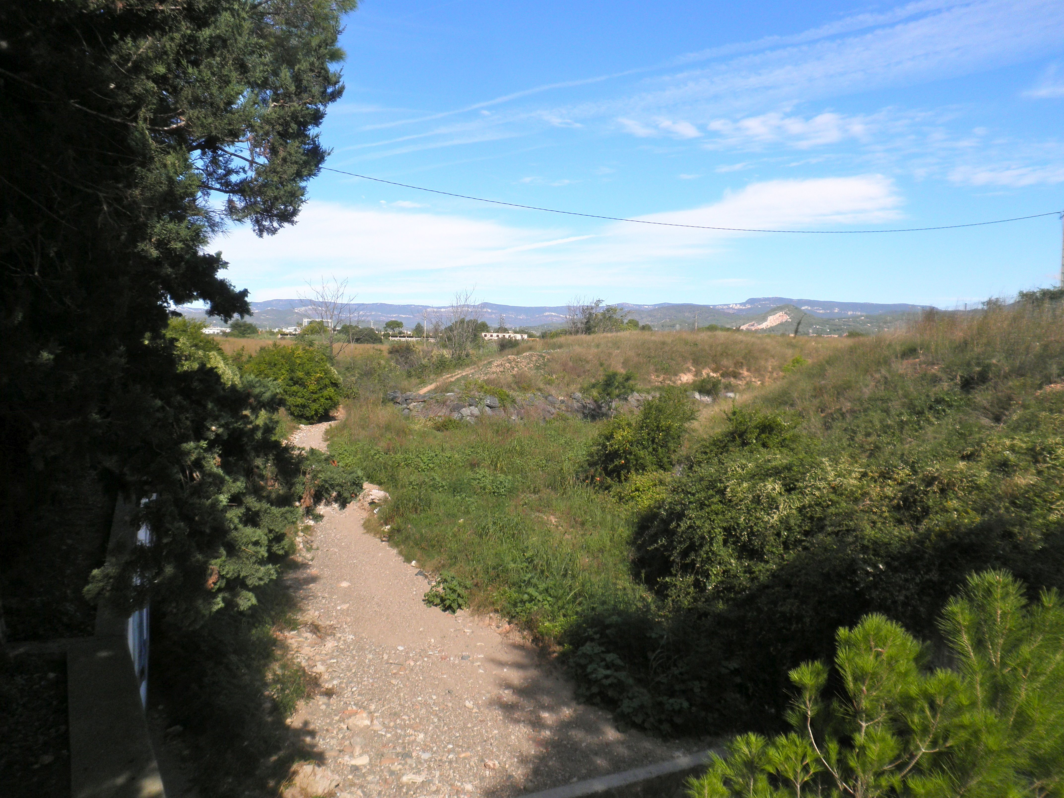 El barranc de Pedret abans d'arribar al barri de la Immaculada, a Reus. Al fons, la pedrera del Coubi